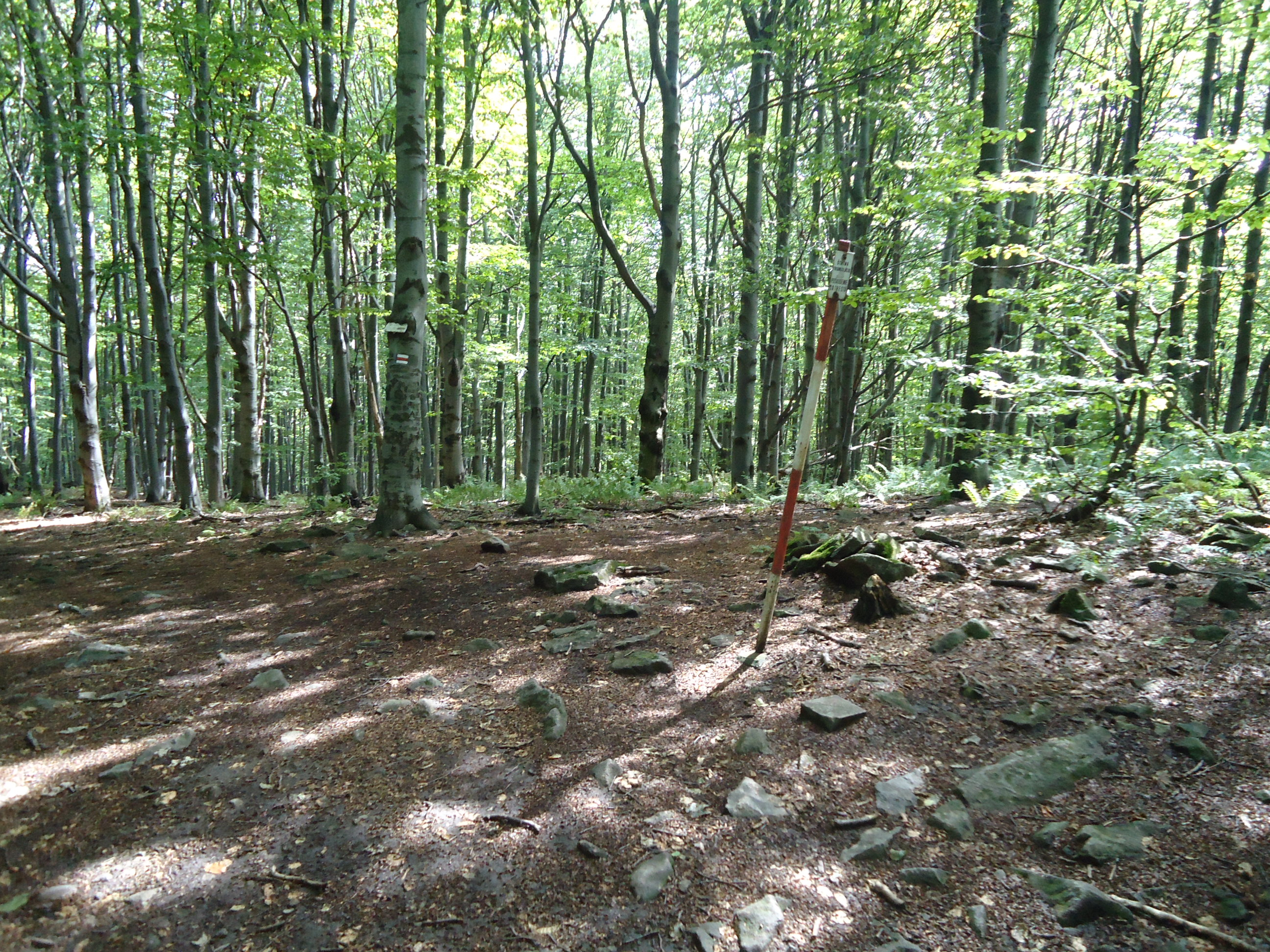 Tri Chotáre, třetí nejvyšší vrchol v Slanských vrších